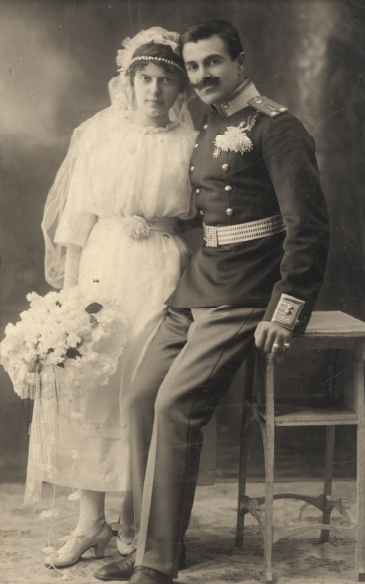 Венчална снимка на Кръстина Стамболова и кап. Атанас Стефанов, Търново, 23 ноември 1919 г.